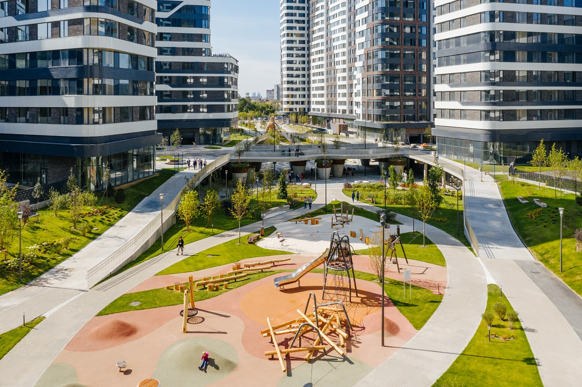 Парк "Зеленая река" в ЖК "Символ", Москва, Россия (на месте завода "Серп и Молот", между ТТК и проездом завода "Серп и Молот"). "Парк" (проезды между двумя кварталами с детской площадкой между ними) открыт 1 августа 2019. Поперечный проезд (по мосту в центре кадра) получил имя проезд Невельского.